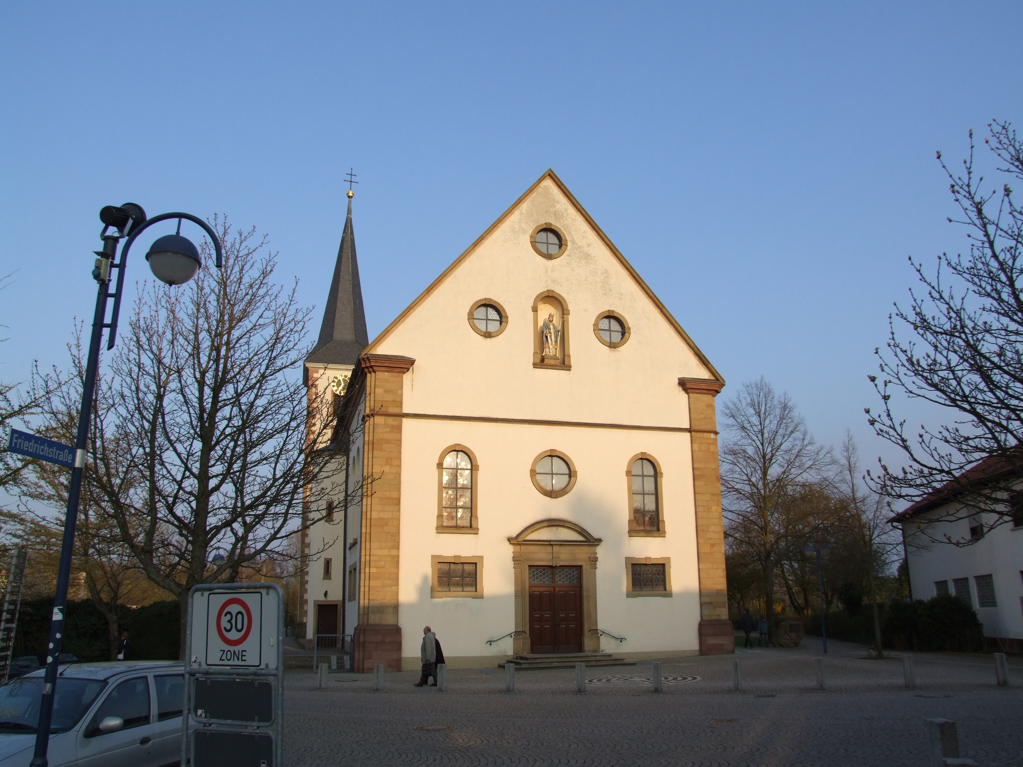 von Westen